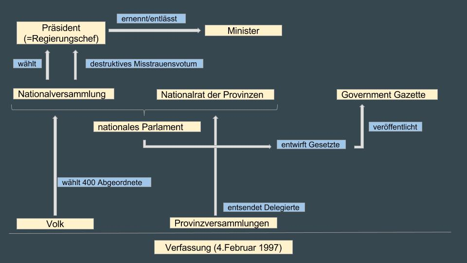 Legislative und Exekutive des politischen Systems in Südafrika